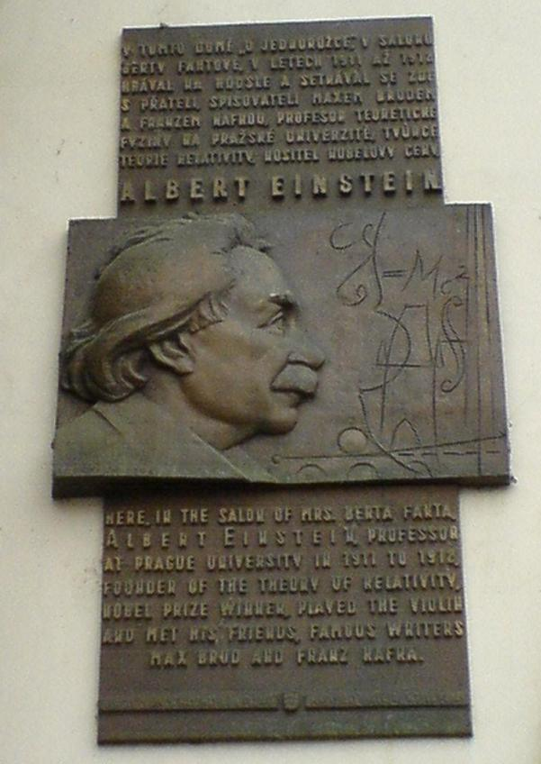 Pamětní deska – Albert Einstein. Praha, Staré Město čp. 551, Staroměstské náměstí 17.